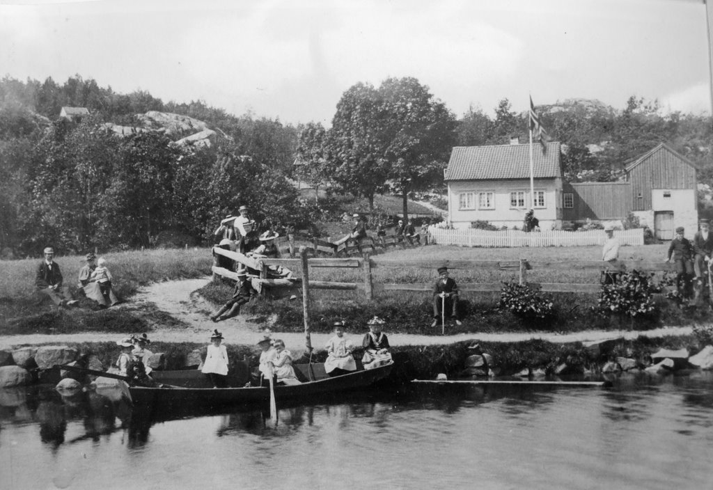 Bildet er fra Skibbuvollen på Østre Vallesverd i Lillesand.